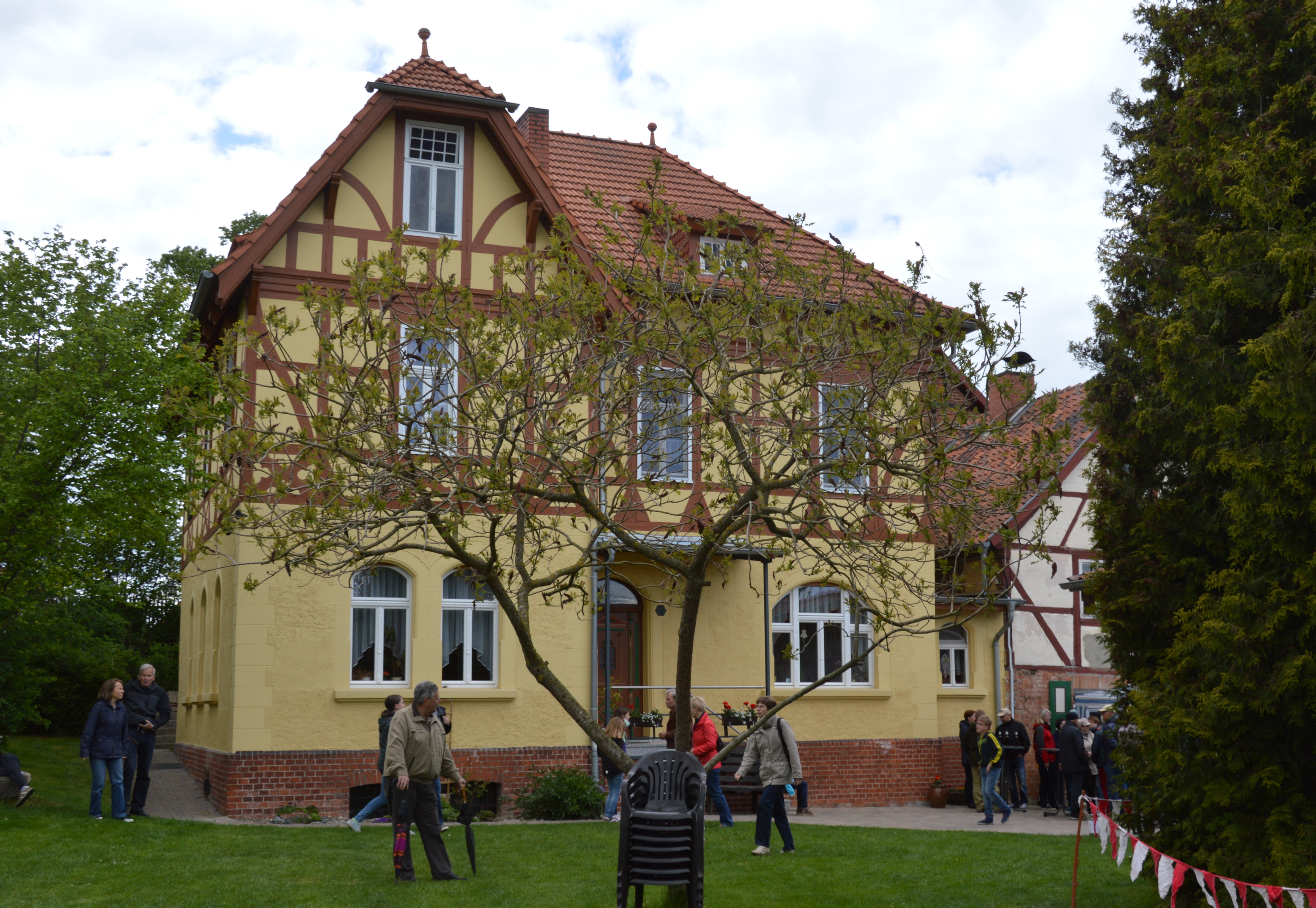 Wassermühle Klein Quenstedt